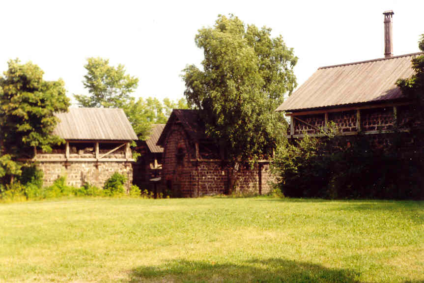 Dalsbruk, kolugnarna sommaren 1992. En bild tagen av Harri Blomberg.